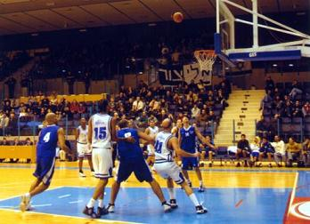 קבוצת הכדורסל עירוני אשקלון במשחק ביתי בהיכל הספורט העירוני.